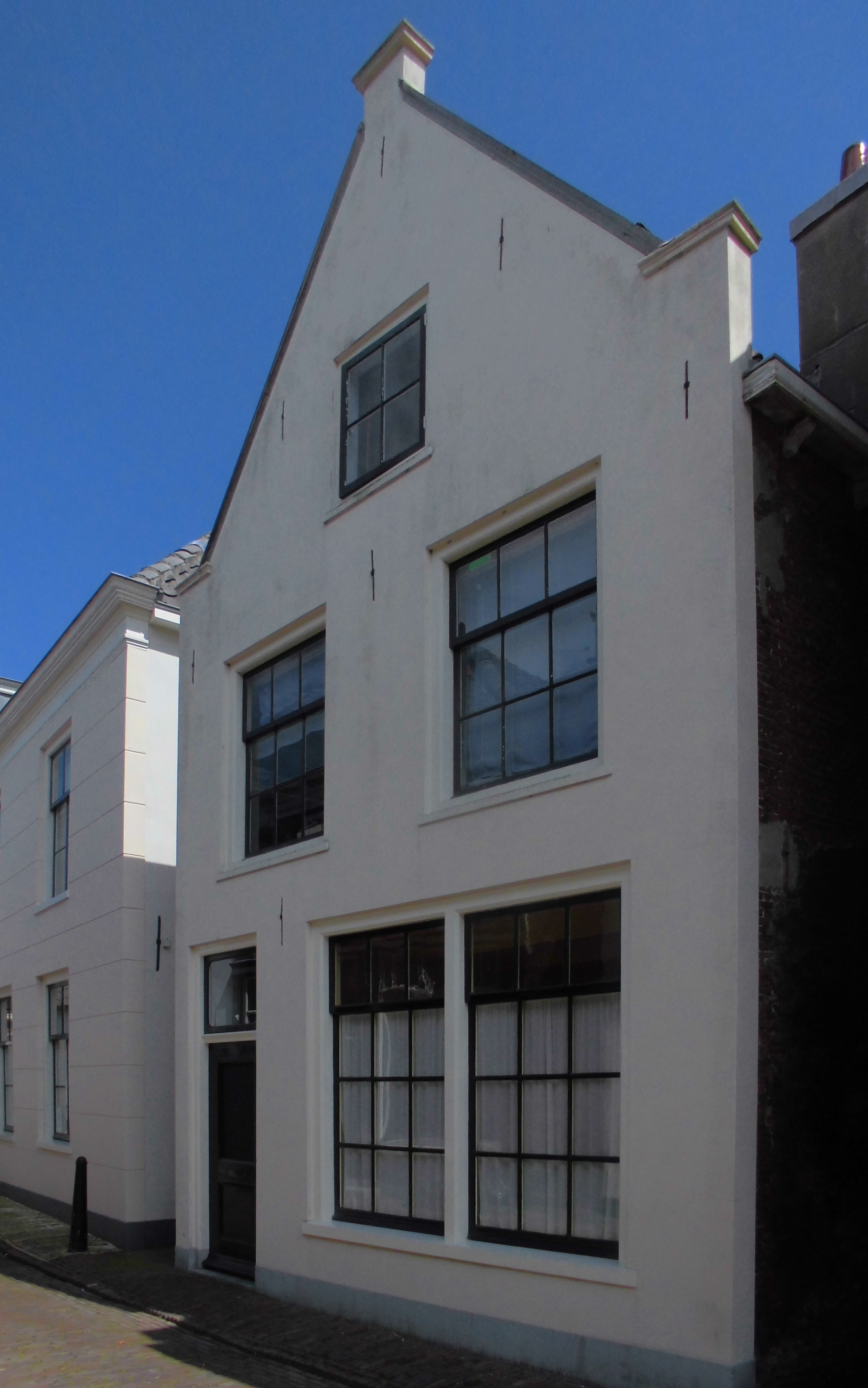 Dorpsstraat 32 Loenen aan de Vecht